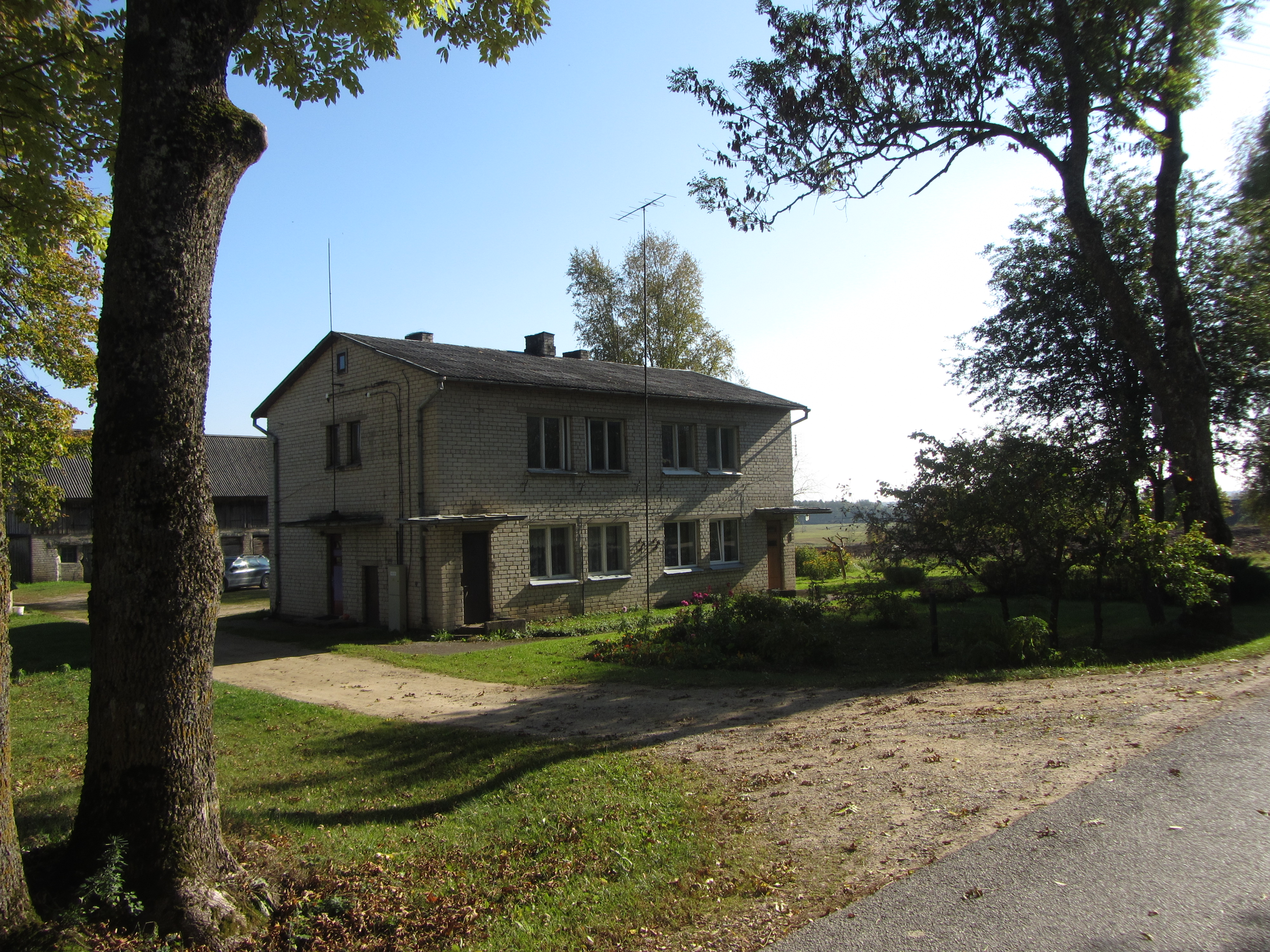 Vilkoliai 42422, Lithuania